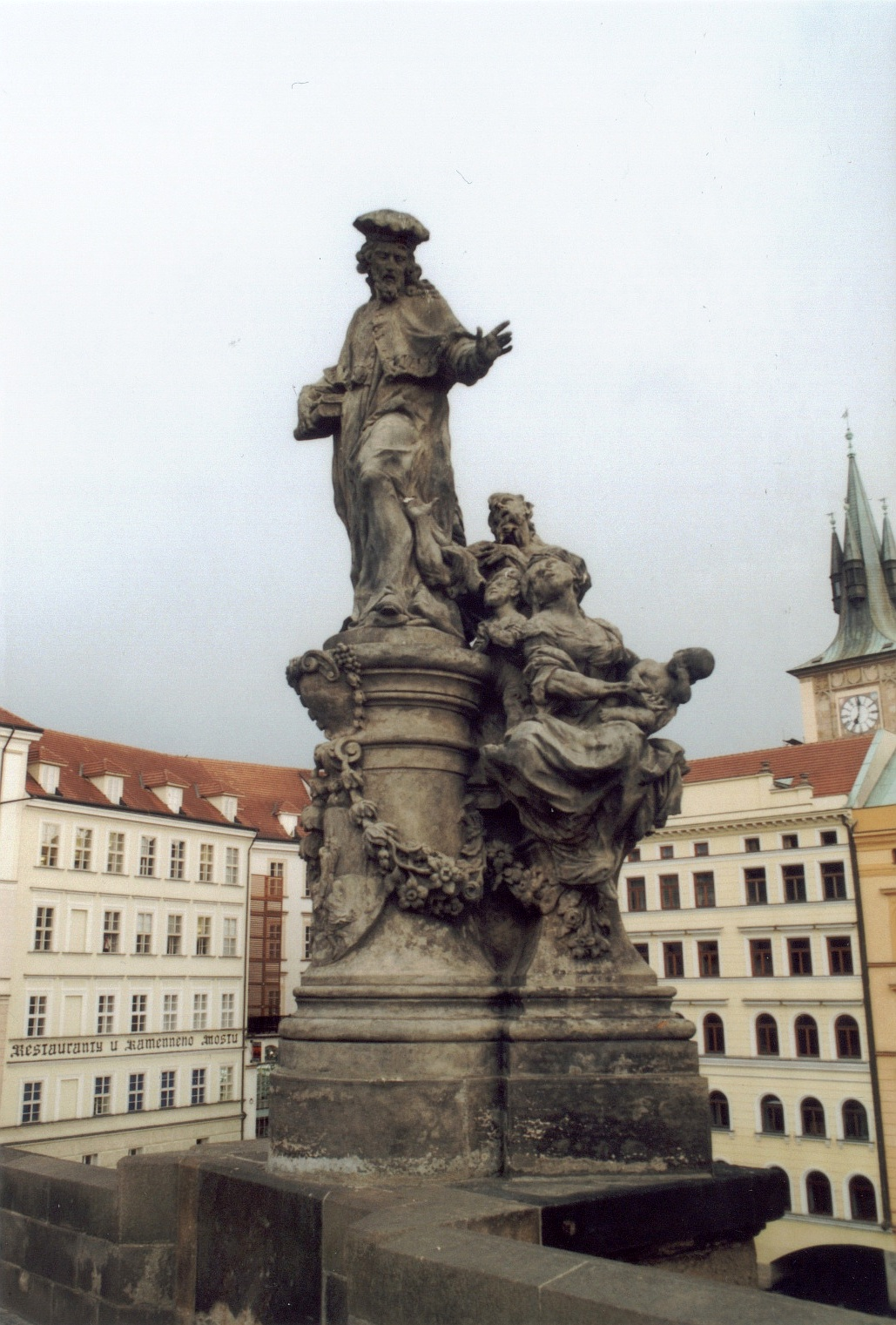 Česky: Sousoší svatého Iva v Praze na Karlově mostě, M. B. Braun 1711 (kopie od F. Hergesela z r. 1908, originál je v Lapidáriu MHMP)